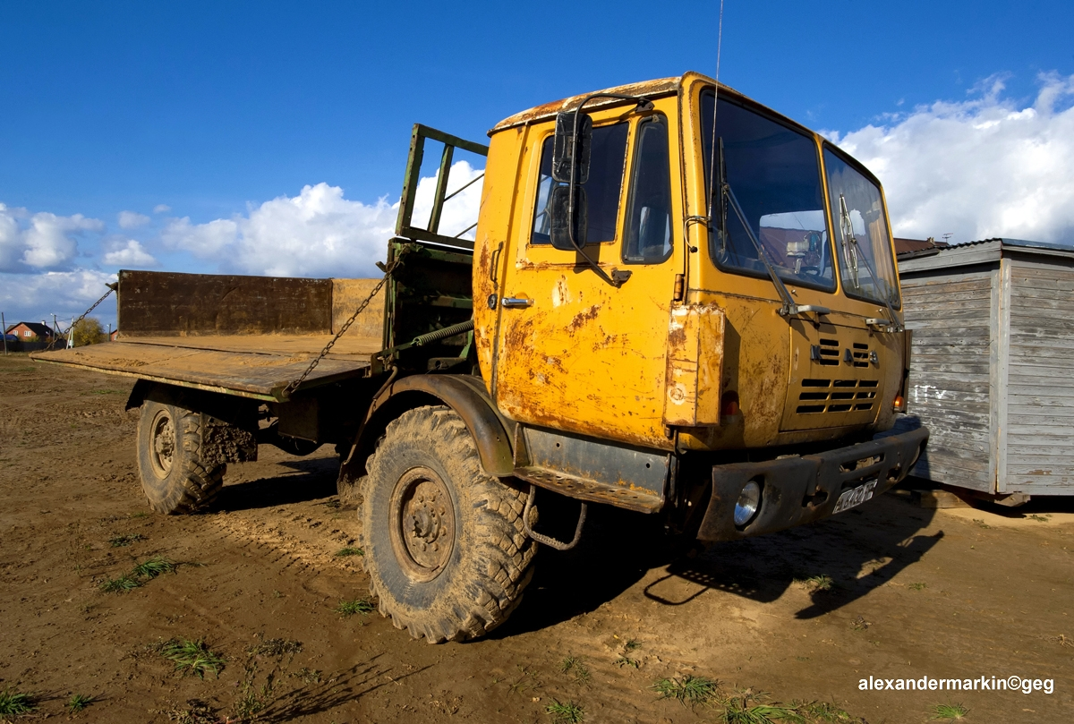 KAZ 4540 (Kolhida)